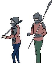 Vespasien machant contre les juif, miniature d'un exemplaire anonyme de 'La geurre des Juifs' de Flavius Joseph - Traduction anonyme - Bruge XVe siècle Shemas detaillant les protection ajouter a des jaques (épaulière/pansiére)